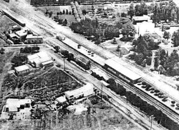 Estación Castelar a principios del siglo 20.